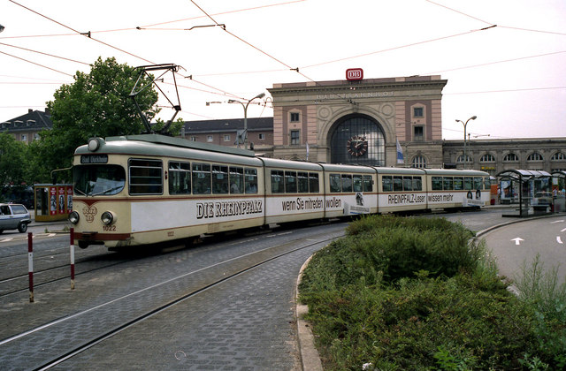 Rhein Haardt Bahn car outside Mannheim Hbf